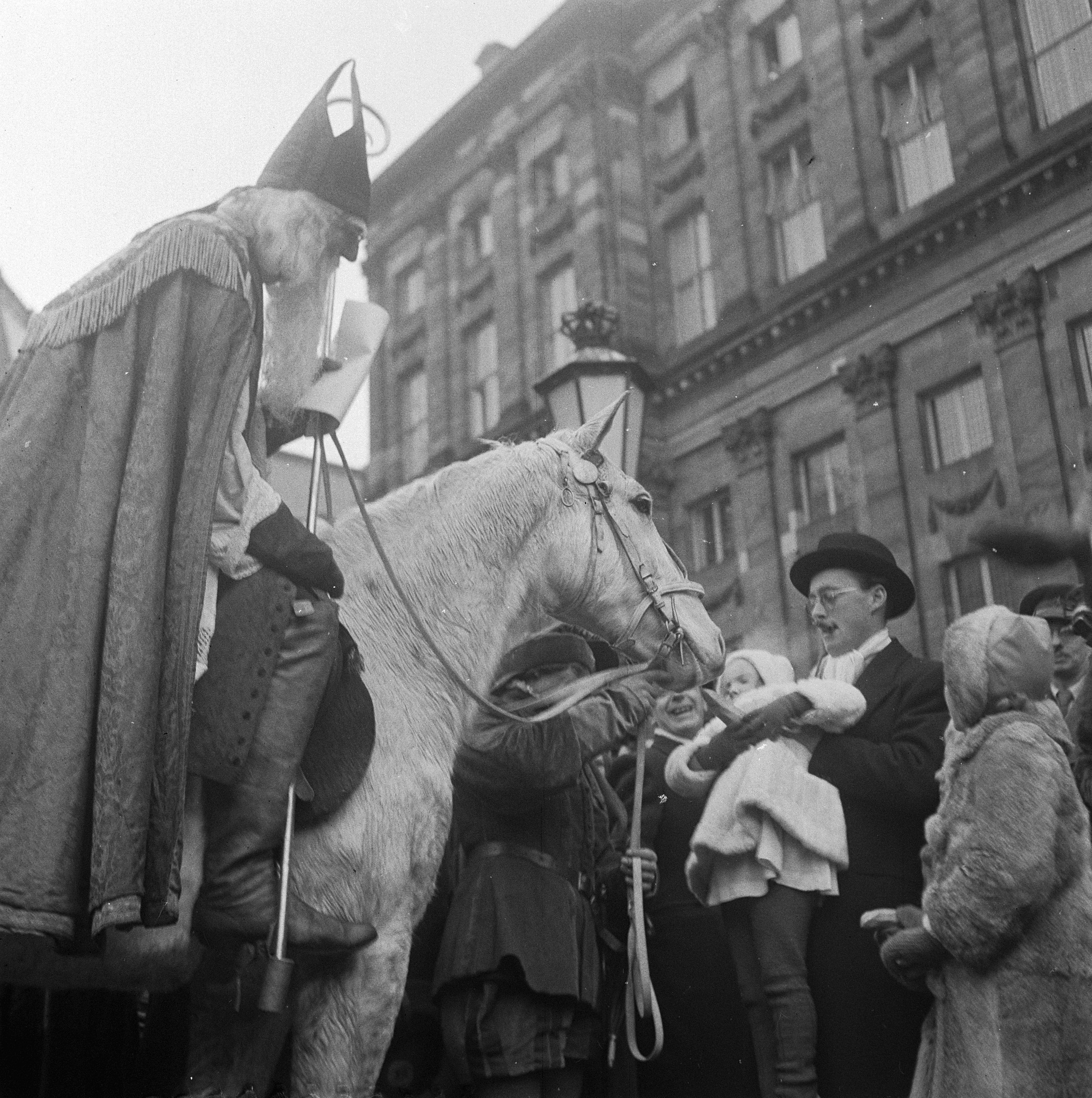 Collectie / Archief : Fotocollectie Anefo Reportage / Serie : [ onbekend ] Beschrijving : St. Nicolaas op de Dam. Prinses Margriet geeft paard een wortel Datum : 3 december 1947 Locatie : Amsterdam, Noord-Holland Persoonsnaam : Margriet, prinses, Sinterklaas Fotograaf : Wisman, Bram / Anefo Auteursrechthebbende : Nationaal Archief Materiaalsoort : Negatief (zwart/wit) Nummer archiefinventaris : bekijk toegang 2.24.01.03 Bestanddeelnummer : 902-4829